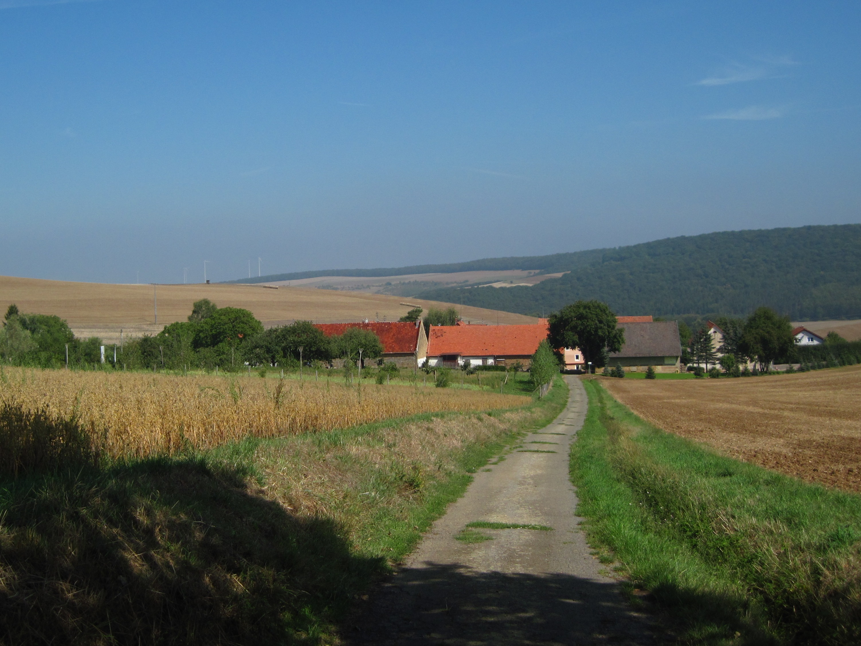 Hengstbacherhof: Sechsteilige Weilersiedlung mit gestaffeltem Scheunenkranz, 19. Jahrhundert. Als Denkmalzone Hengstbacherhof unter Ensembleschutz. Ansicht von Südwesten.